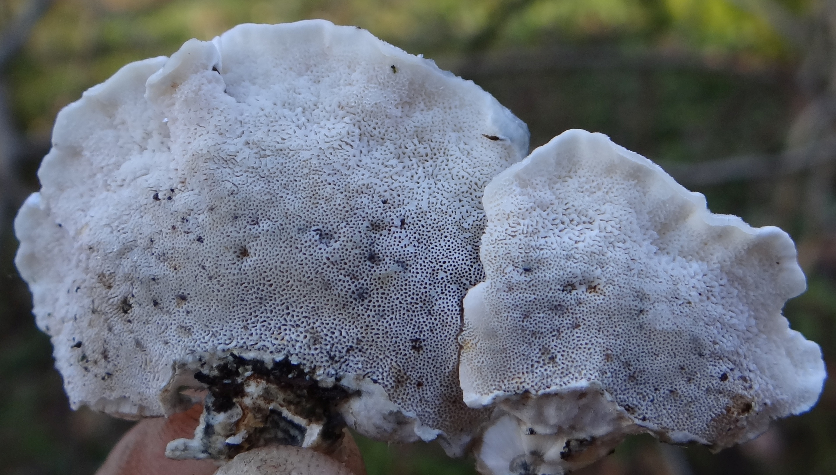 Postia subcaesia on Quercus. Location: Poland, Puszcza Niepołomicka, rezerwat przyrody 'Dębina